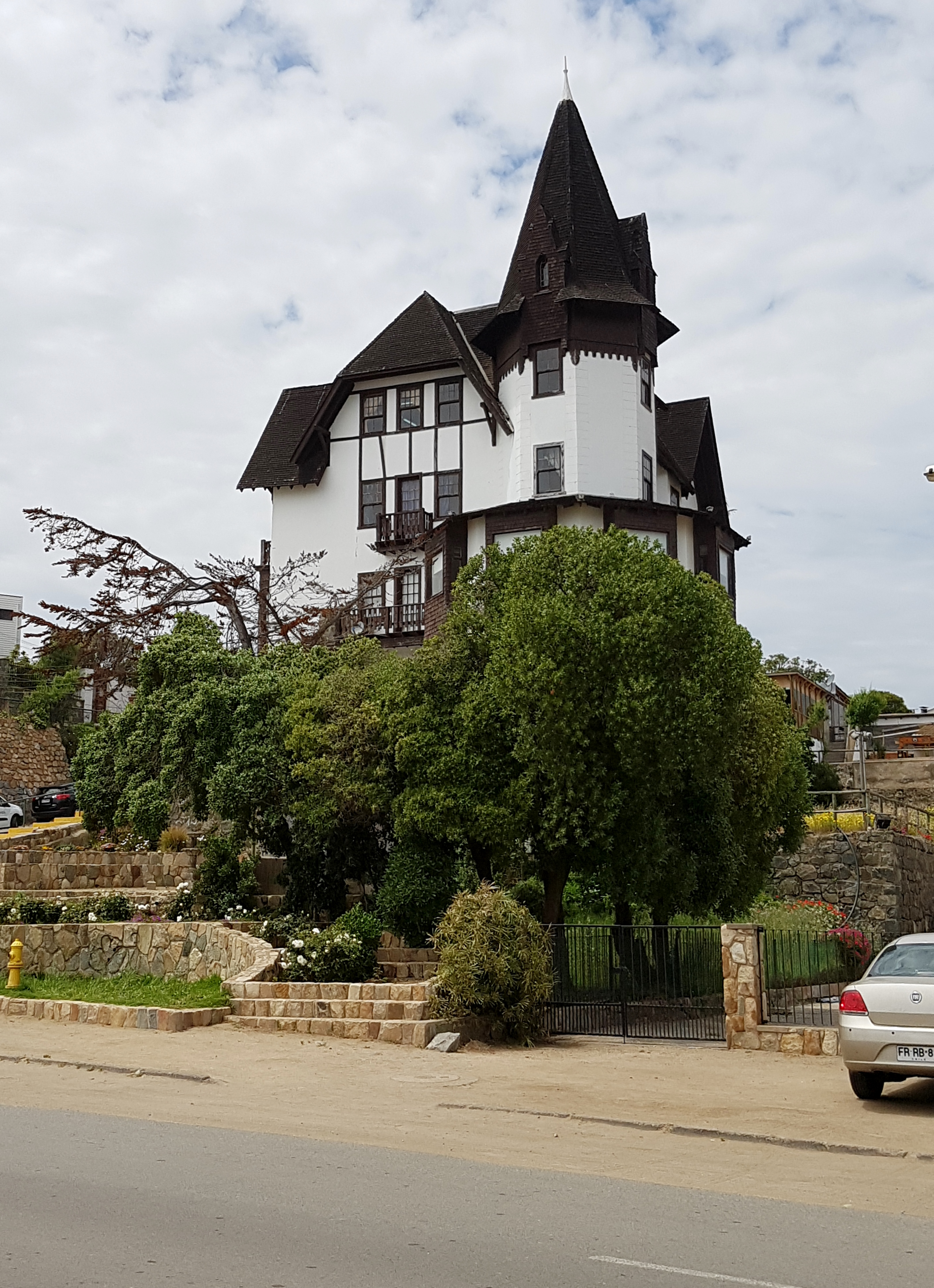 El chalet Recart, construido en 1912 por Josué Smith Solar en el balneario de Papudo, Chile.